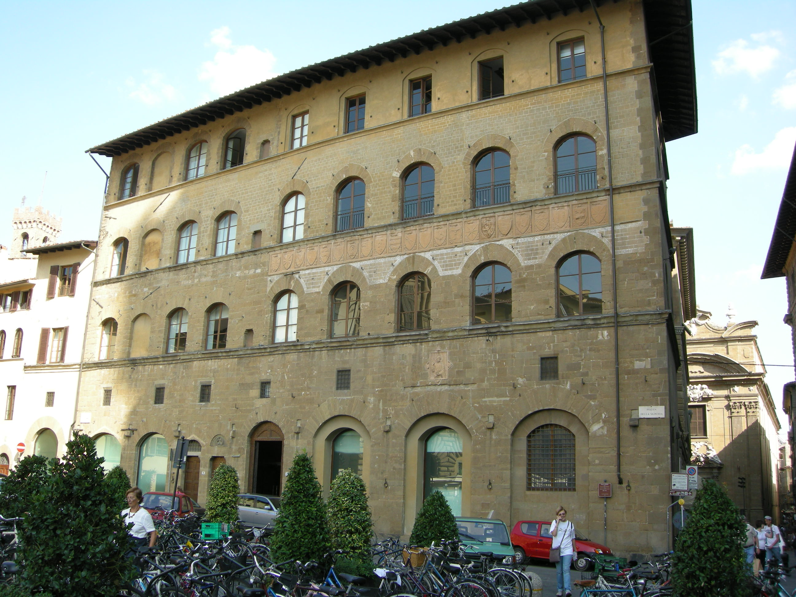 Tribunale della mercanzia